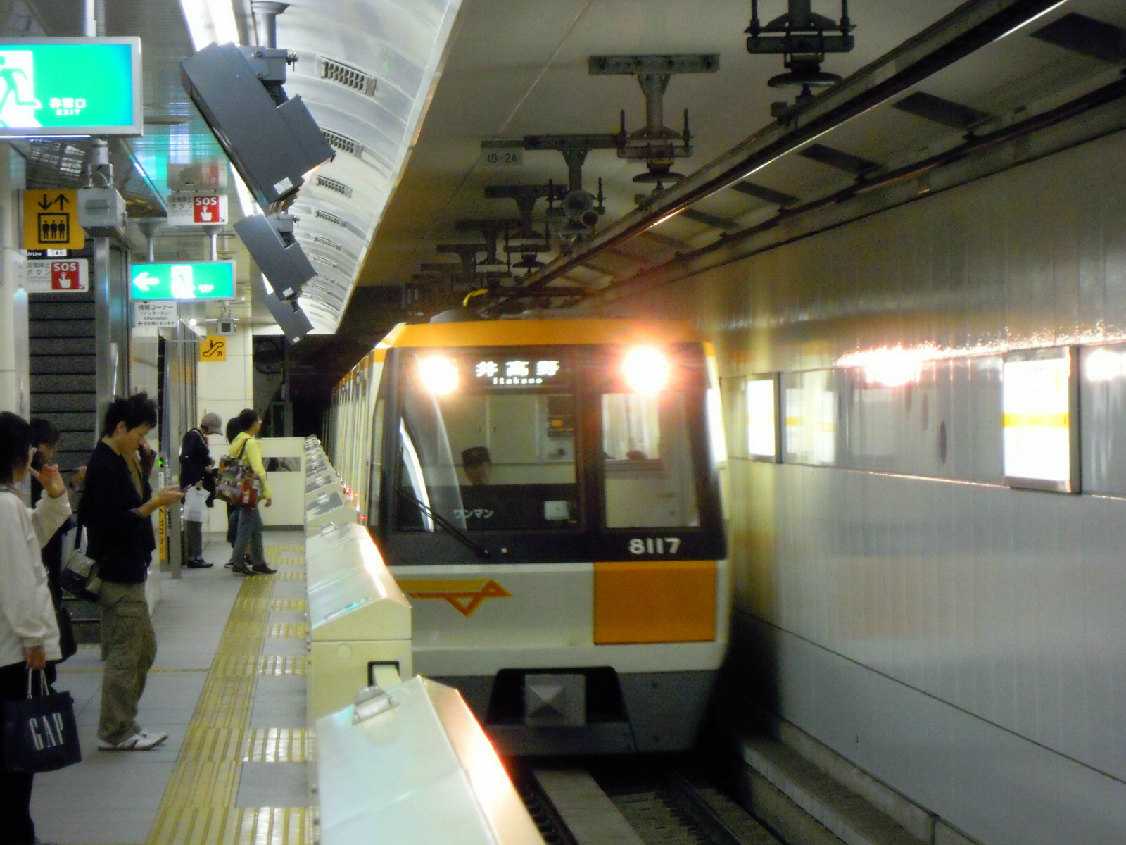 Imazatosuji Line Gamo 4-chome Station platform